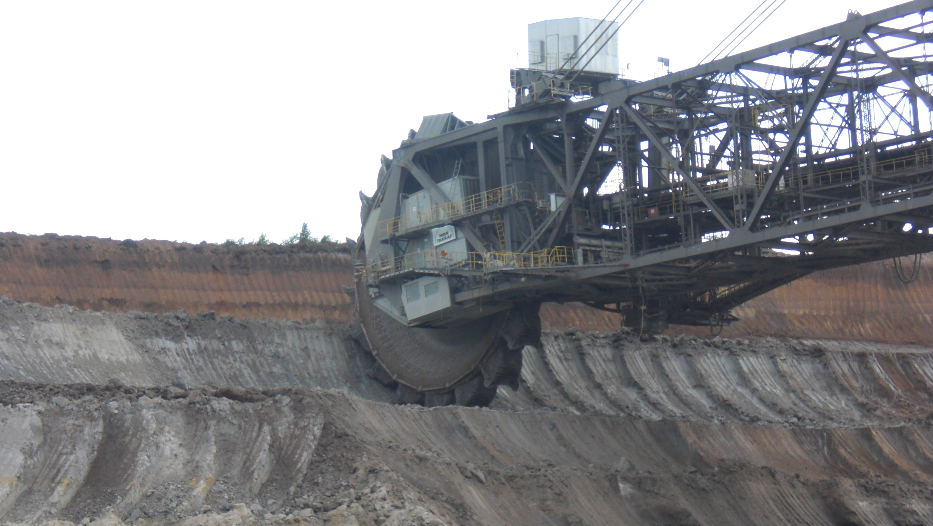 Ausleger mit Schaufelrad des SRs 6300 1510 im Vorschnitt im Tagebau Nochten am Kraftwerk Boxberg